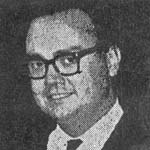 Claudio Orrego Vicuña, político chileno.